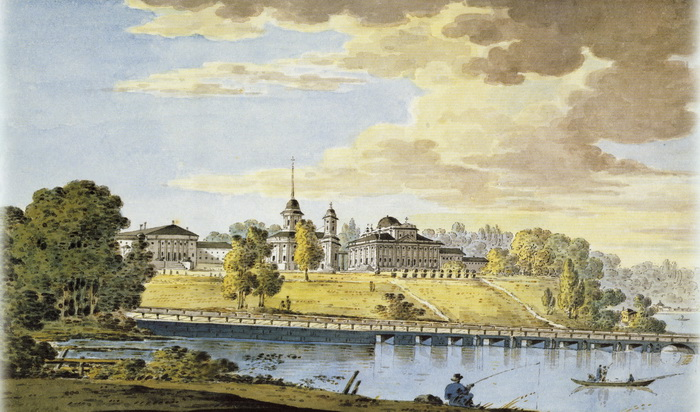 Храм Преображения Господня (Балашиха) Репродукция картины неизвестного художника.